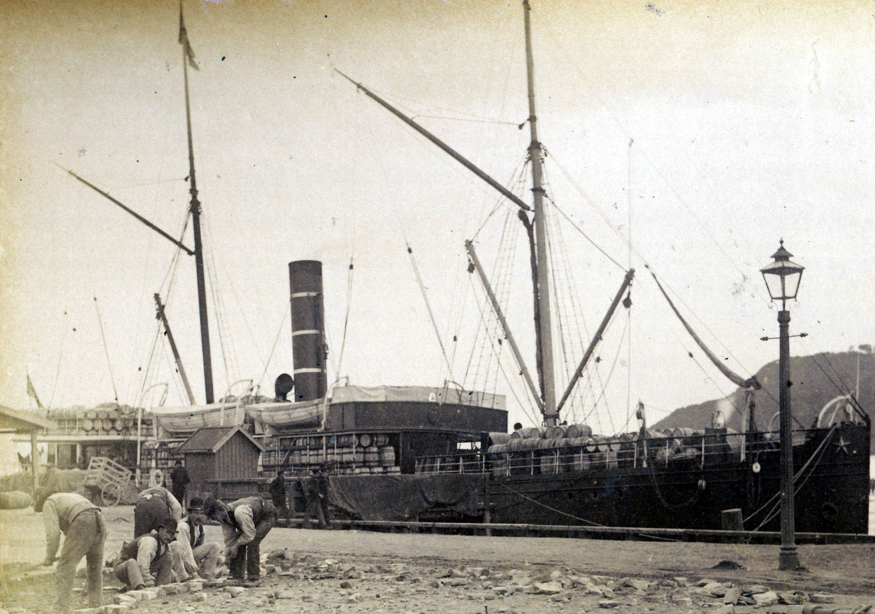 Format: Fotopositiv Dato / Date: 1893 Fotograf / Photographer: Jørgen Wickstrøm Sted / Place: Trondheim Eier / Owner Institution: Trondheim byarkiv, The Municipal Archives of Trondheim Lenke / Link: Se diskusjonen rundt de to fotografene Johan Erik Wickstrøm og Jørgen Johan Brock Wickstrøm (Preus Museum) Litteratur: Trondhjemske Samlinger: 1893 - et år i Trondhjem. Bilder av Jørgen Wickstrøm (Trondheim 2001) Arkivreferanse / Archive reference: Tor.H40.B24.F1628 [T0083] Merknad: Båten er muligens D/S Mira, bygget i Glasgow 1891 som turistskip.